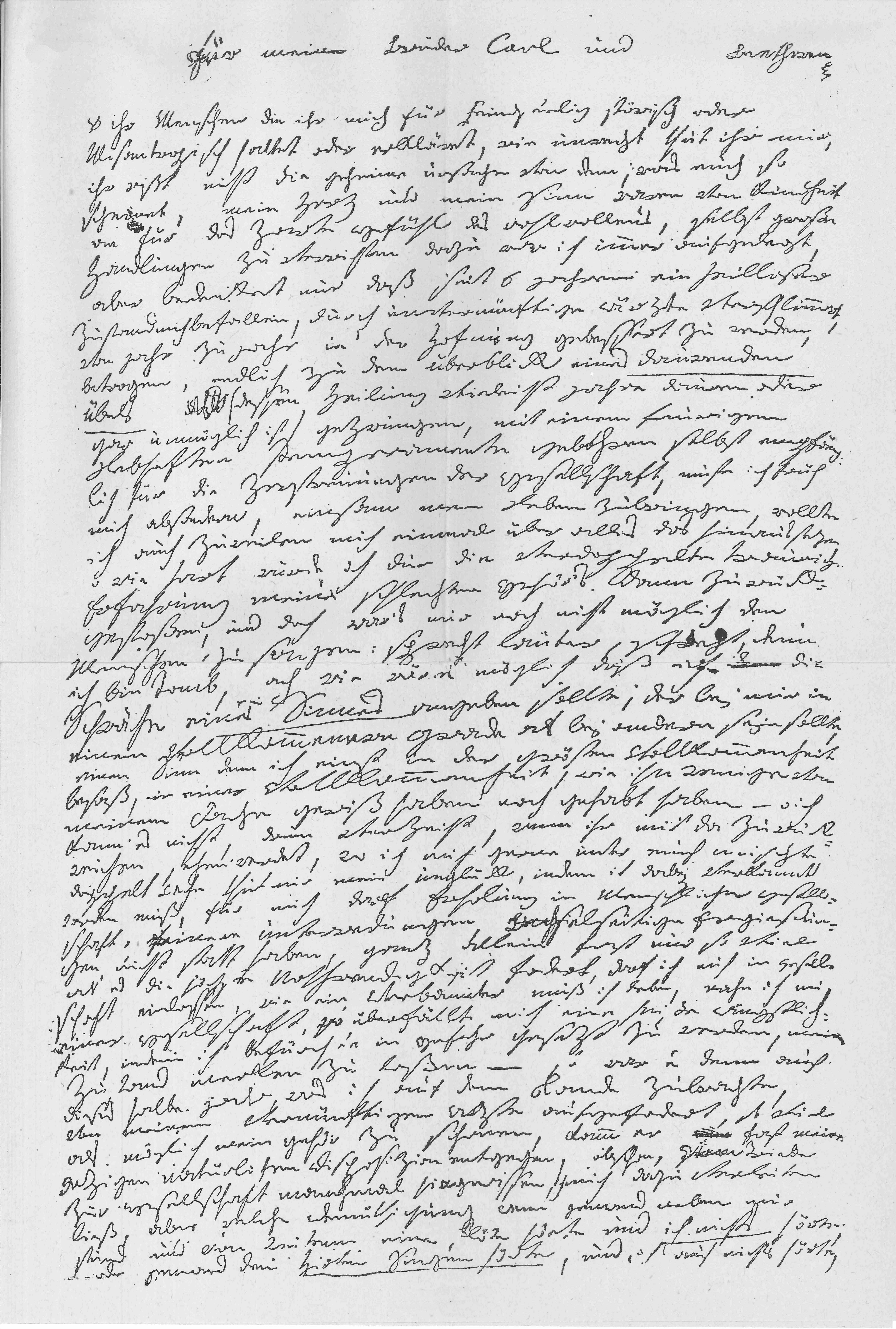 Beethoven Heiligenstädter Testament Faksimile Seite 1